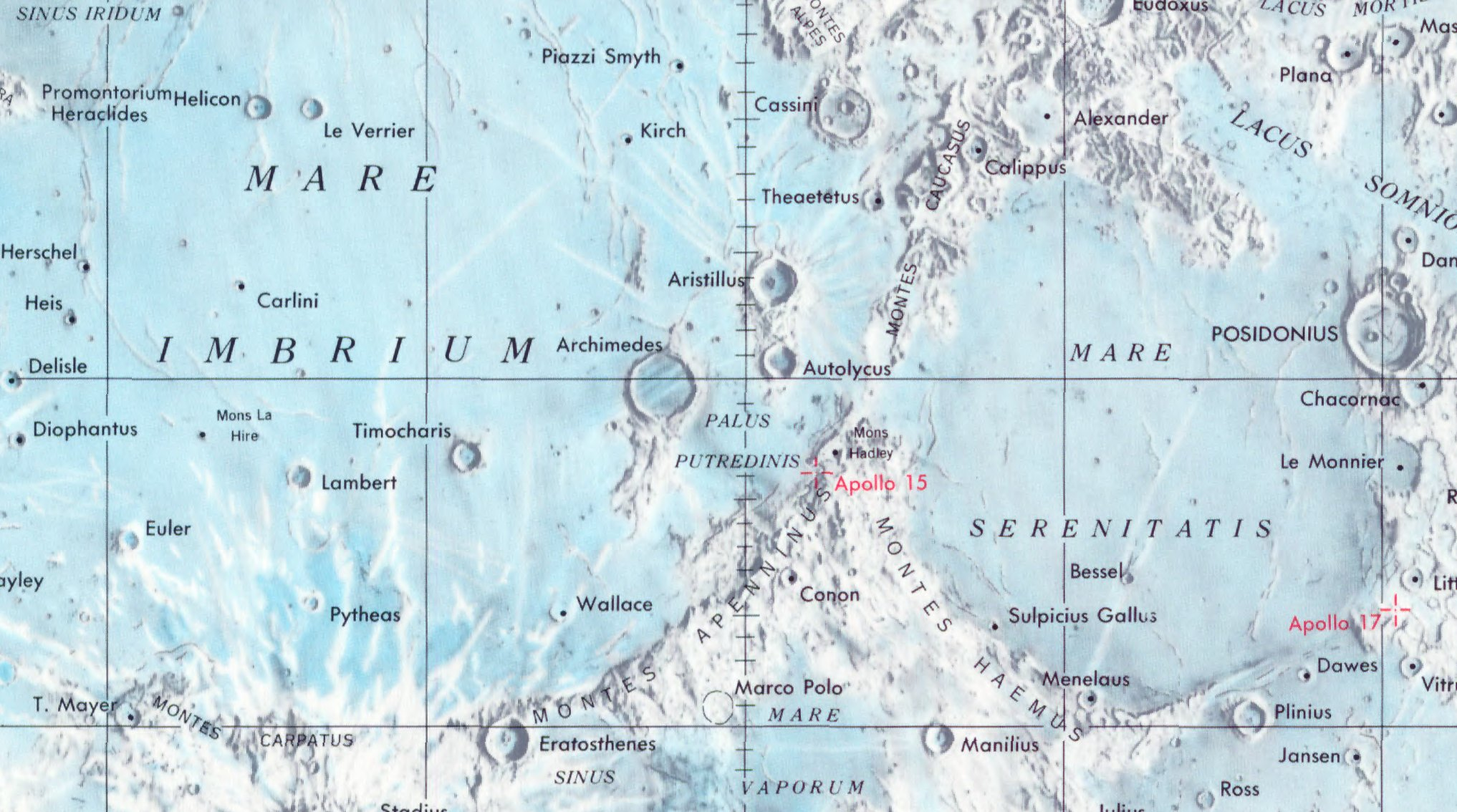 Cráter lunar Archimedes. Localización. (Lunar Chart LPC1. Second Edition)